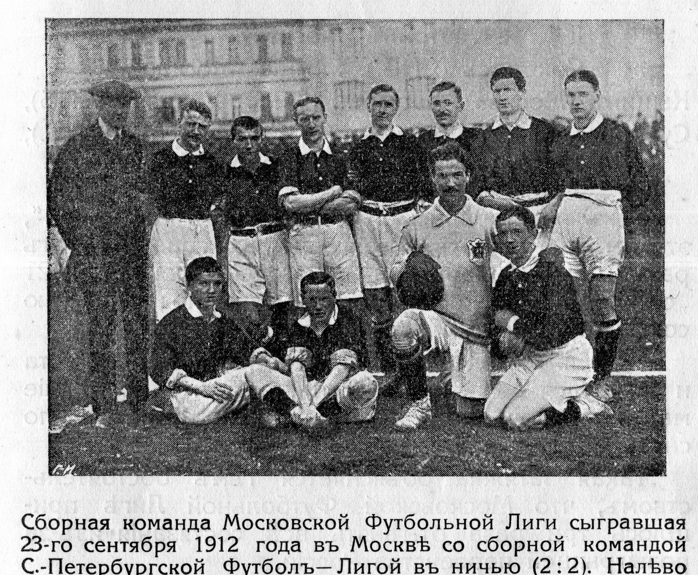 Сборная команда Московской футбольной лиги, сыгравшая 23 сентября 1912 года в Москве со сборной командой Санкт-Петербургской Футбол-Лиги вничью 2:2